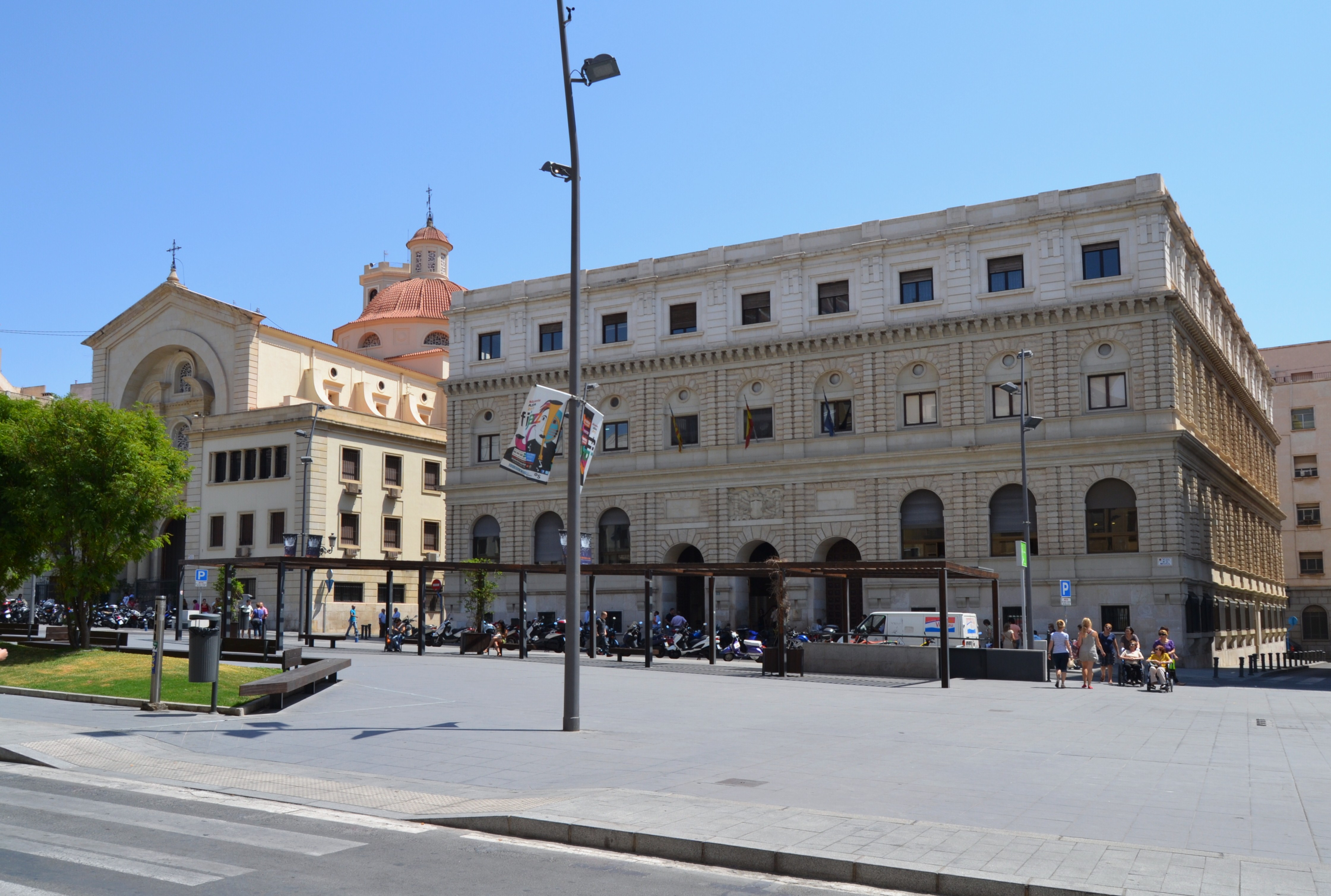 Plaça de la Muntanyeta, esglesia de la Mare de Déu de Gràcia i Hisenda, Alacant.